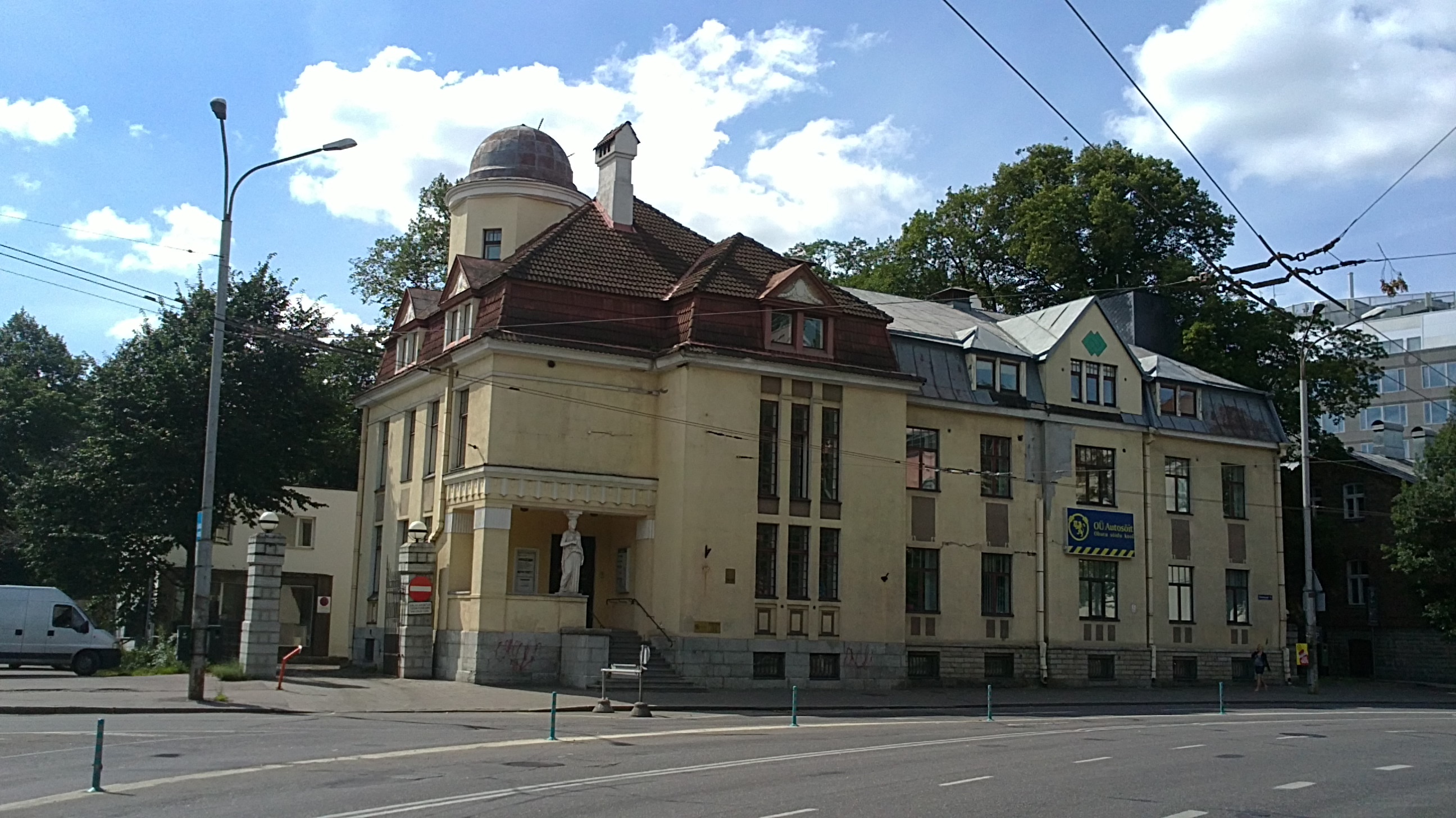 Tallinna kesklinna, Estonia puiestee 15 hoone, arhitekt Aleksandr Jaron (†1935)